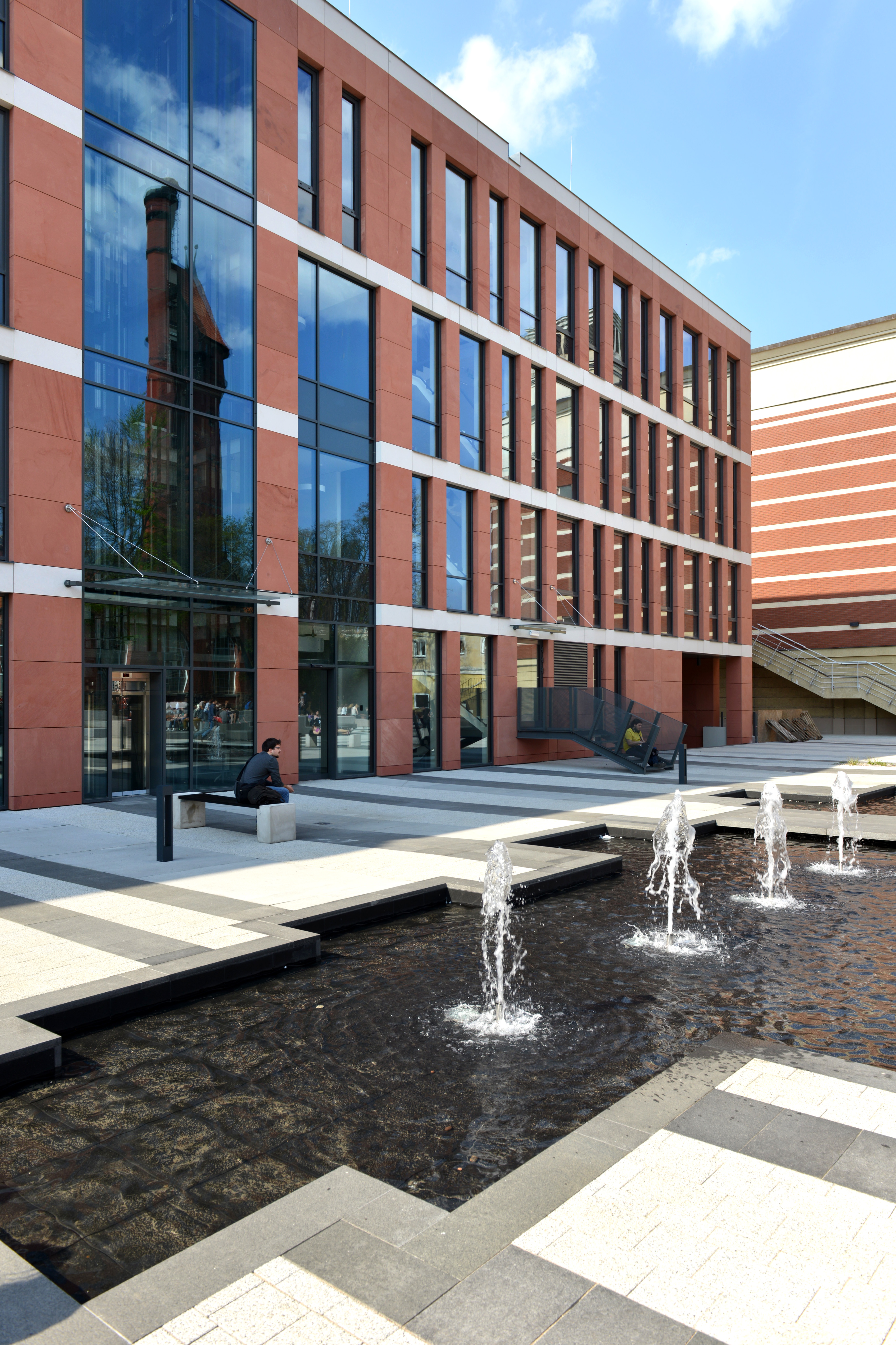 Budynek Nanotechnologii B Politechniki Gdańskiej.